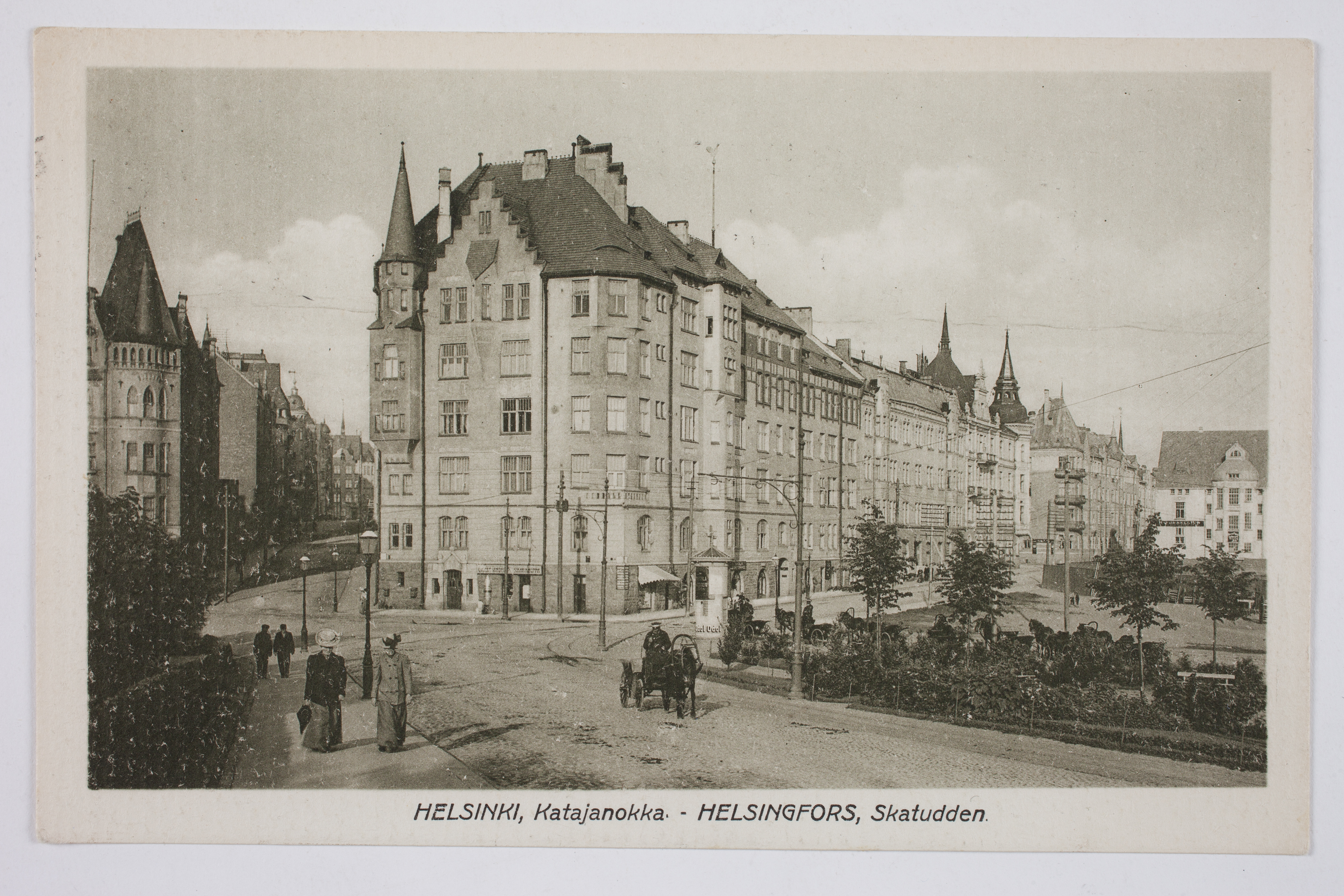 Korsningen av Hamngatan, Lotsgatan och Kronbergsgatan på Skatudden, vykort. Ur boken Helsingfors i ord och bild Utgiven av Svenska litteratursällskapet i Finland, 2012